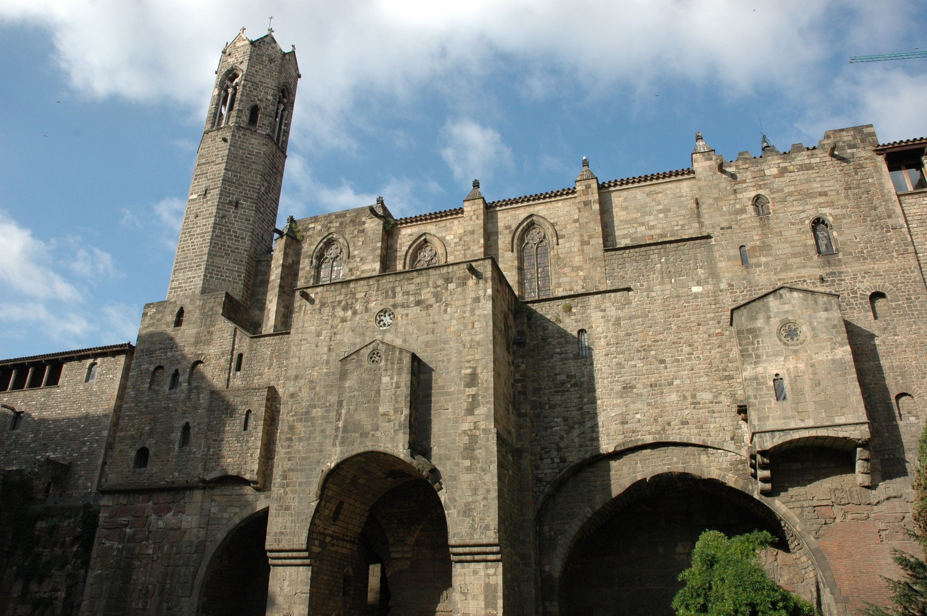 Barcelona - Capella de Santa Àgata